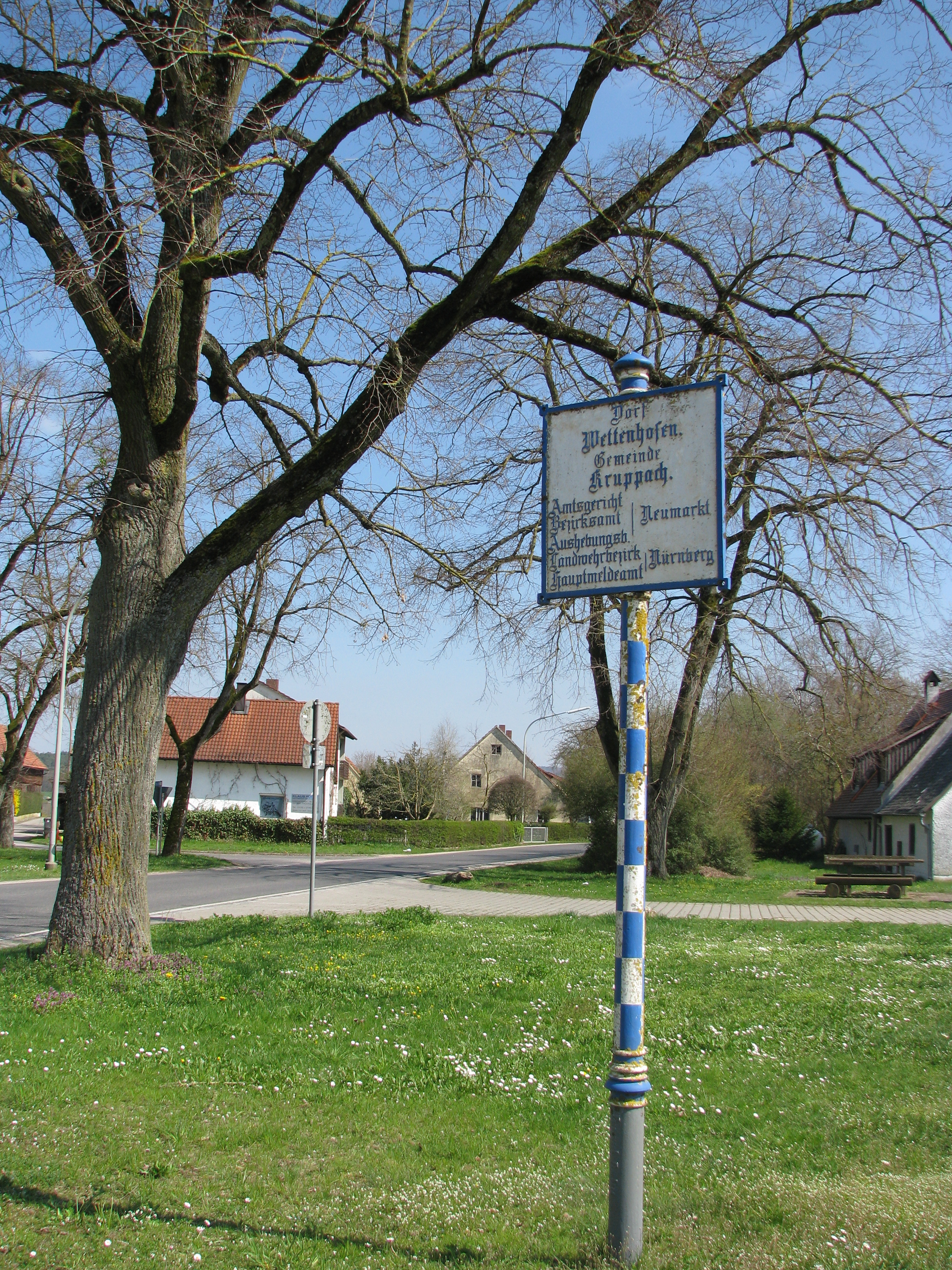 Wettenhofen, Ortsteil von Mühlhausen im Landkreis Neumarkt in der Oberpfalz, historischer Wegweiser